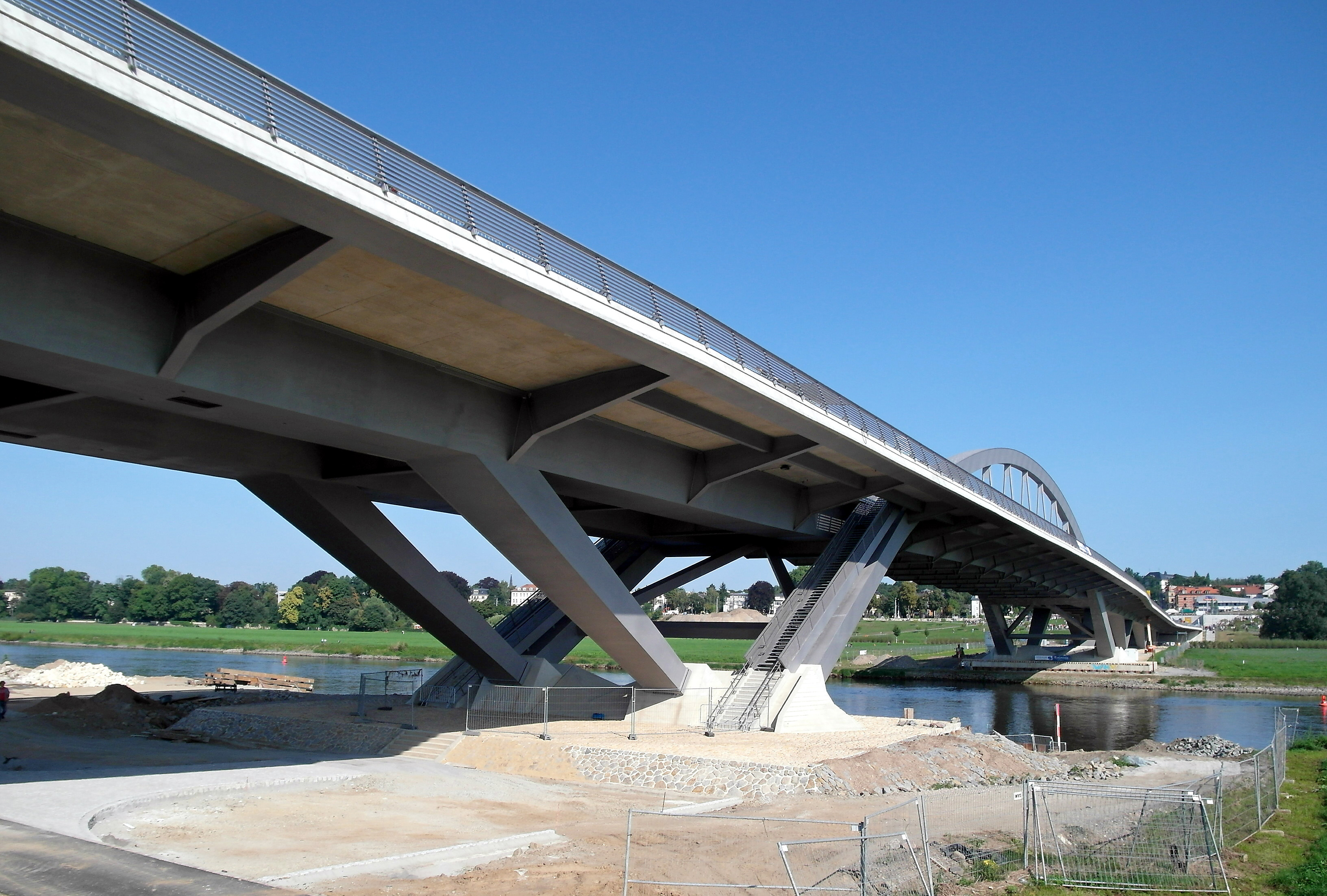 24.08.2013 Dresden-Johannstadt: Einweihung der Waldschlößchenbrücke (GMP: 51.063856,13.776616). Blick über die Elbe nach Dresden-Neustadt. 1996 beschließt der Stadtrat den Brückenbau. Der erste Baggerhub war am 29. November 2000. Am 07.07.2004 wird das Elbtal wird zum Weltkulturerbe erklärt und im Juli 2006 der Brücke wegen wieder aberkannt. Gebaut wird trotzdem, nur teurer. Länge incl. Hochstraßen 770m, eigentliche Elbbrücke 140 m, vierspurige Fahrbahn, 30 m breit. Die Planungen gingen aus einem Wettbewerb hervor, den 1997 das Berliner Büro Eisenloffel + Sattler, Ingenieure - Kolb + Ripke, Architekten (ESKR) gewann. Die Gesamtkosten betrugen kurz vor der Eröffnung der Brücke im Juni 2013 knapp 182 Mio. Euro. [SAM8864.JPG]20130824040DR.JPG(c)Blobelt